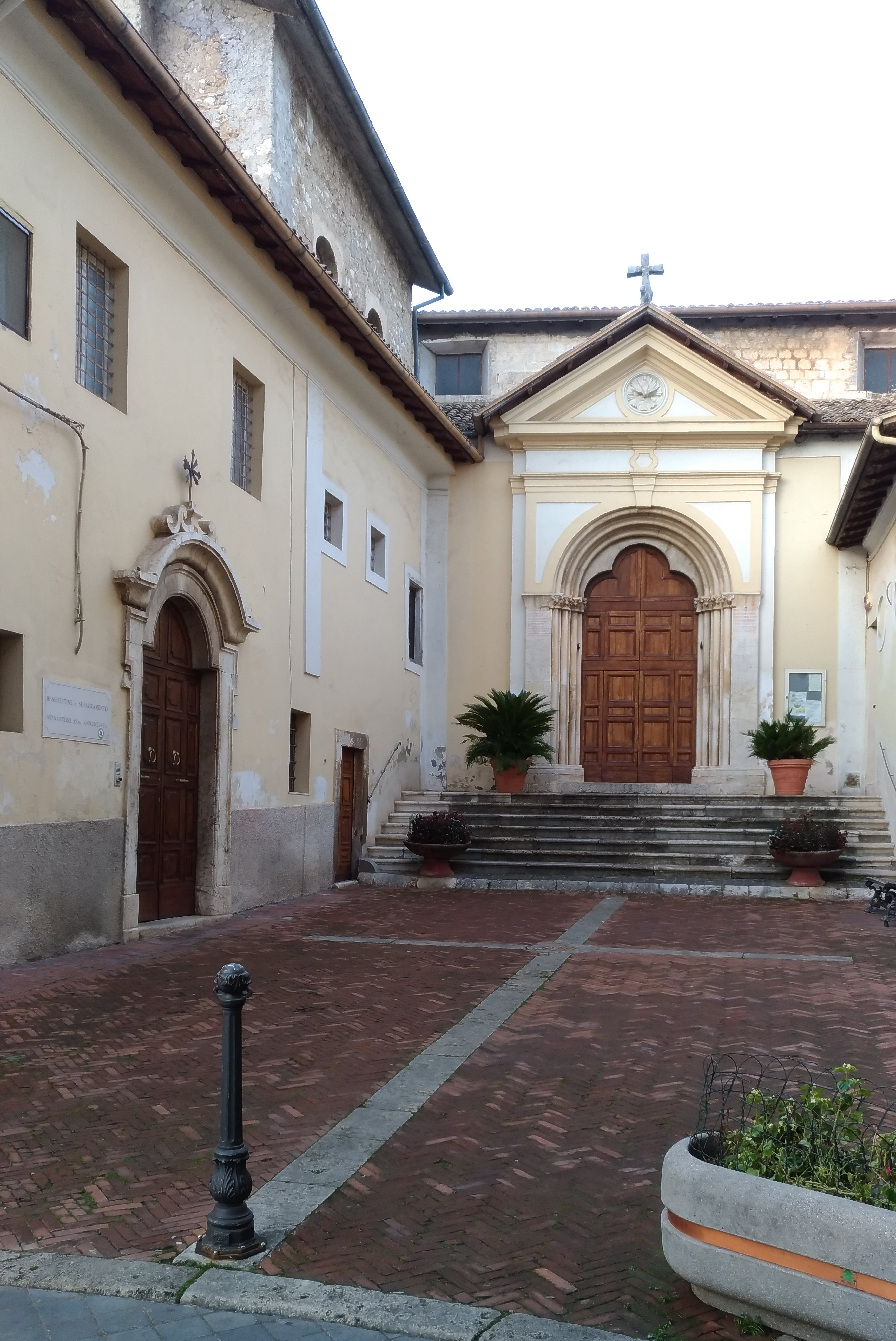 Chiesa di Santo Stefano e monastero dell'Annunziata (Alatri)